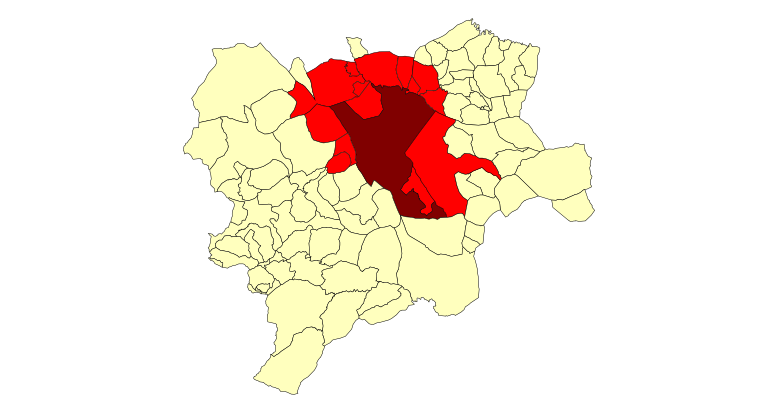 Mapa metropolitano de Albaceteo (el municipio de Albacete en oscuro).